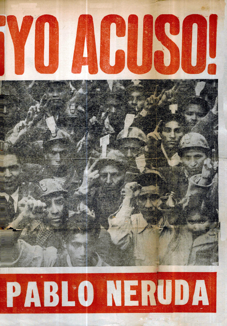 ¡Yo acuso! Pablo Neruda. 1948